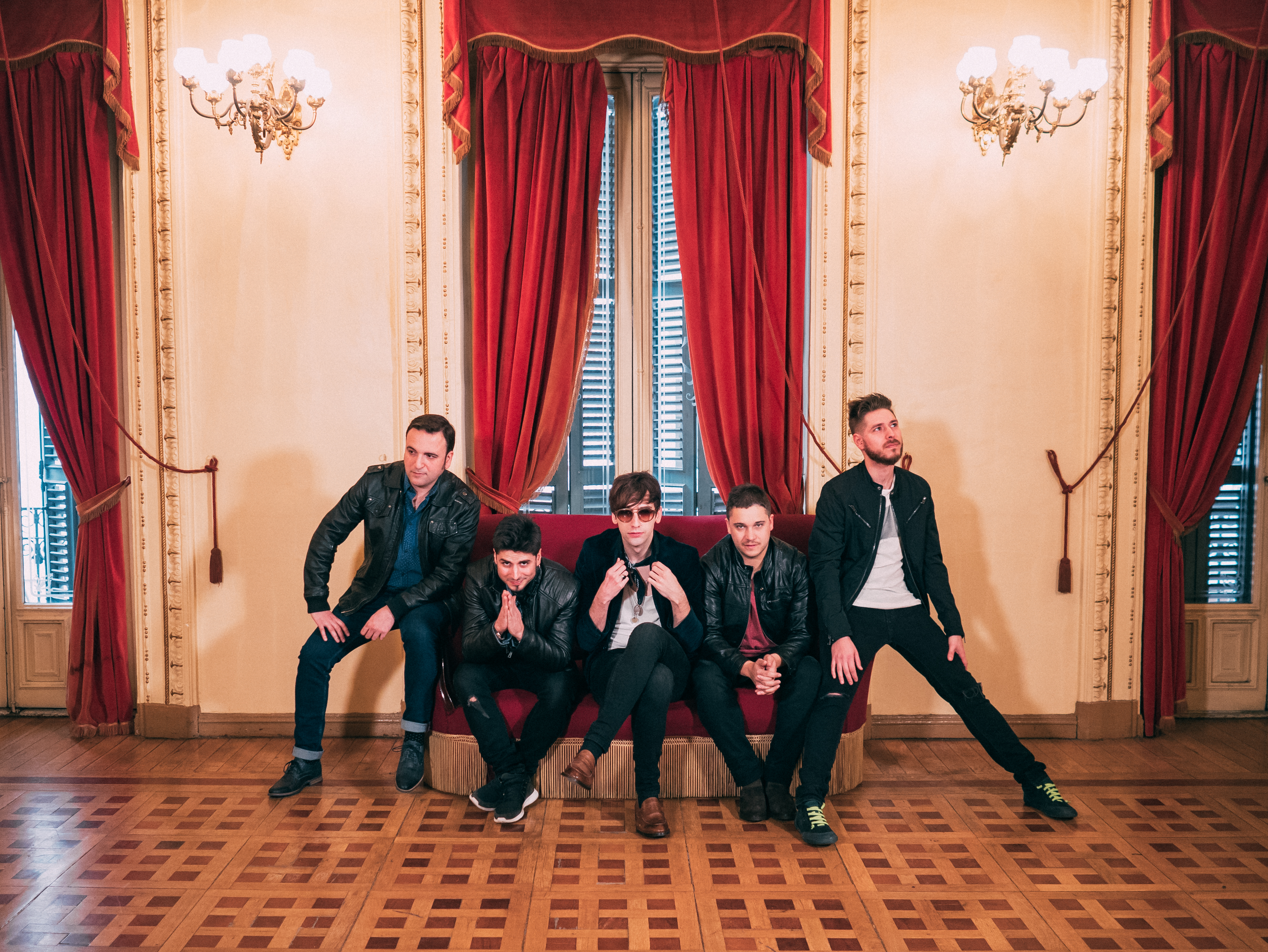 Integrantes de Sharon Bates: De izda. a dcha, Sergio, Javi, Cristian, Dani y Rober.